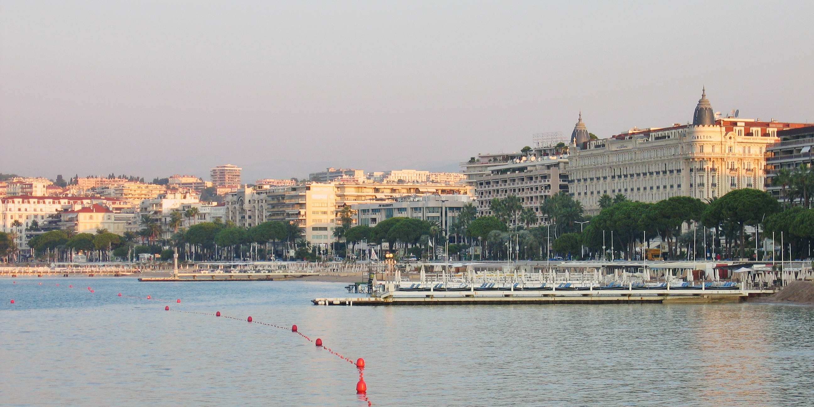 Cannes